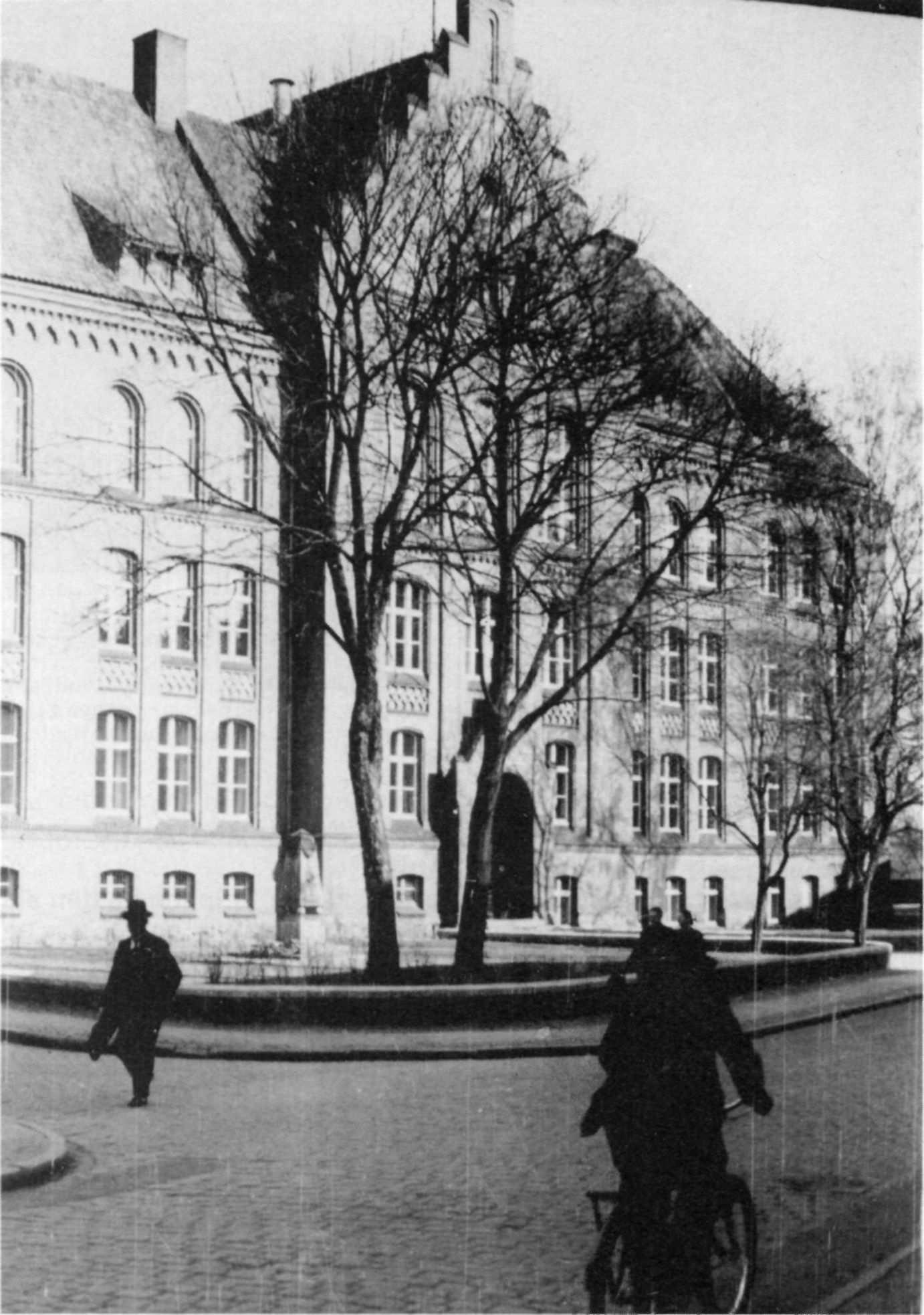 Fotografie des humanistischen Gymnasiums in Tilsit